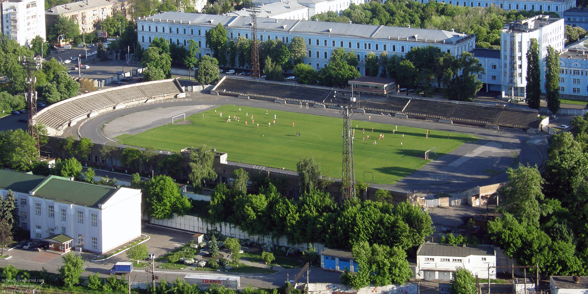 стадион ЦСКА (Киев)